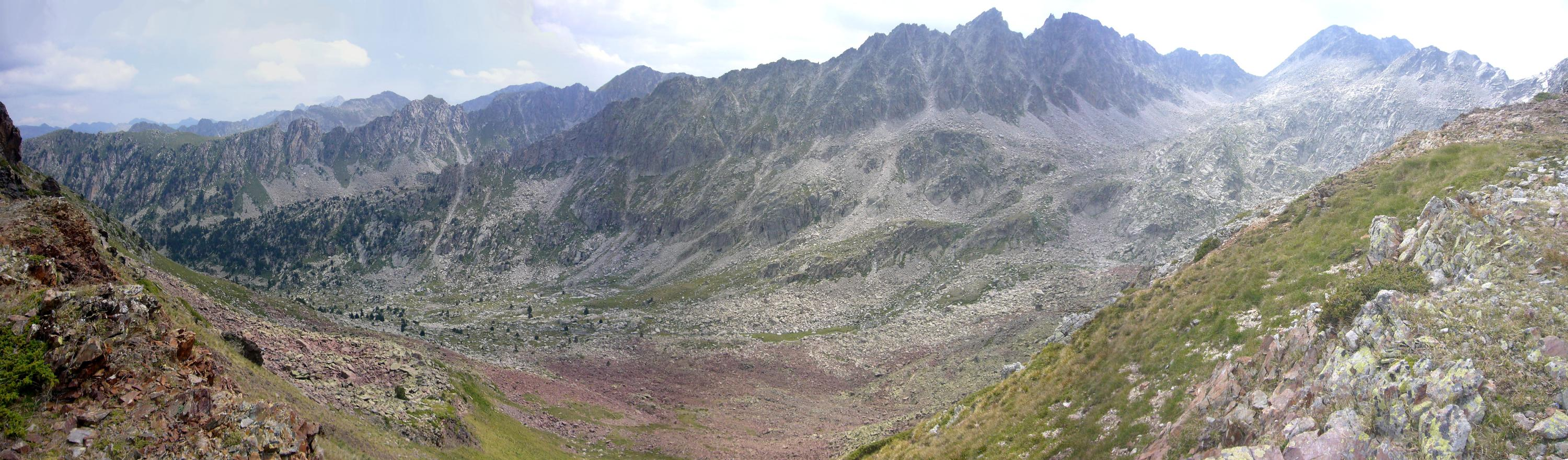 Cometa de les Mussoles vista des del Crestell del Montanyó; la Vall de Boí, Alta Ribagorça, Catalunya